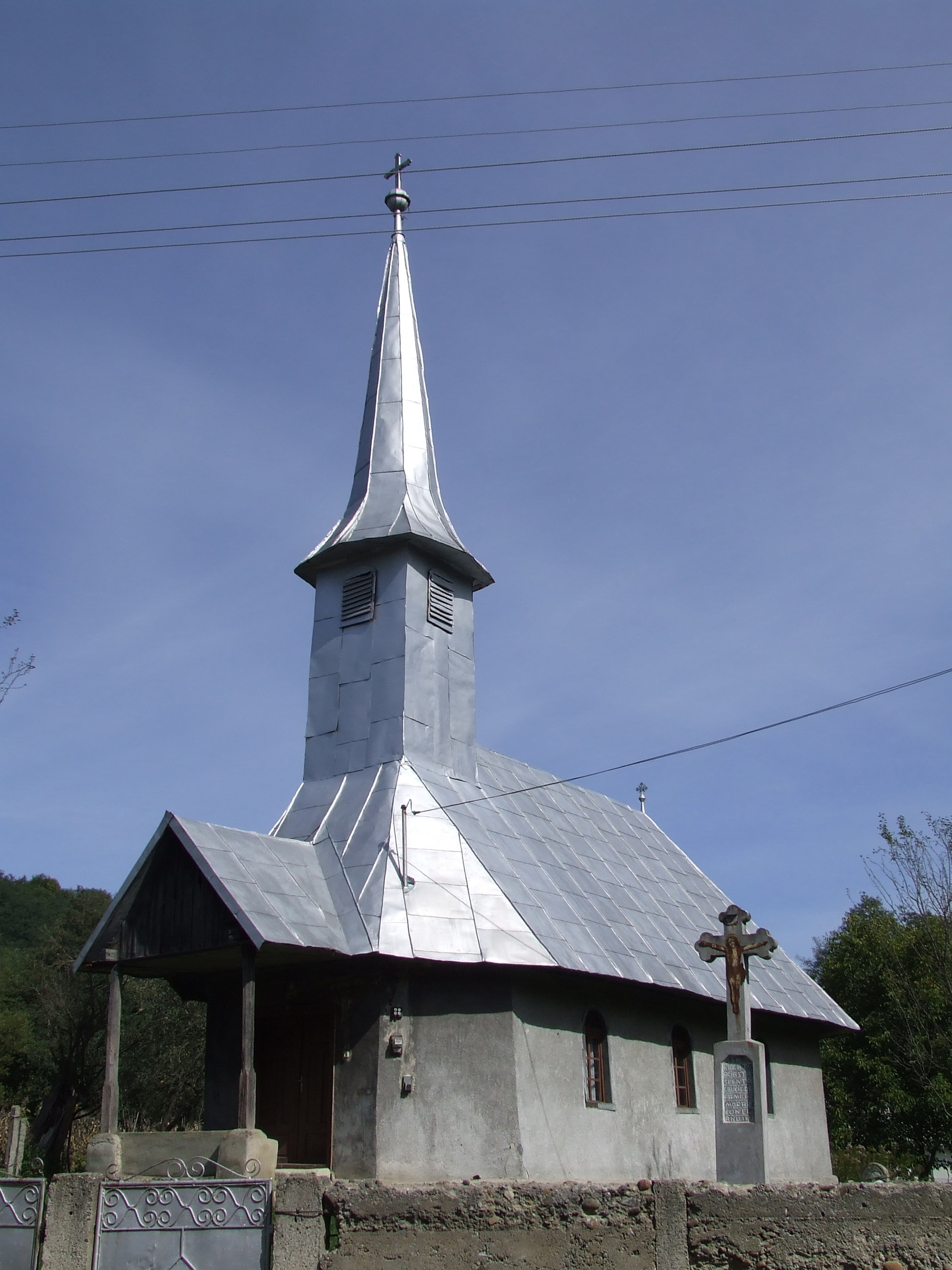 Biserica de lemn din Vârteşca, judeţul Sălaj.